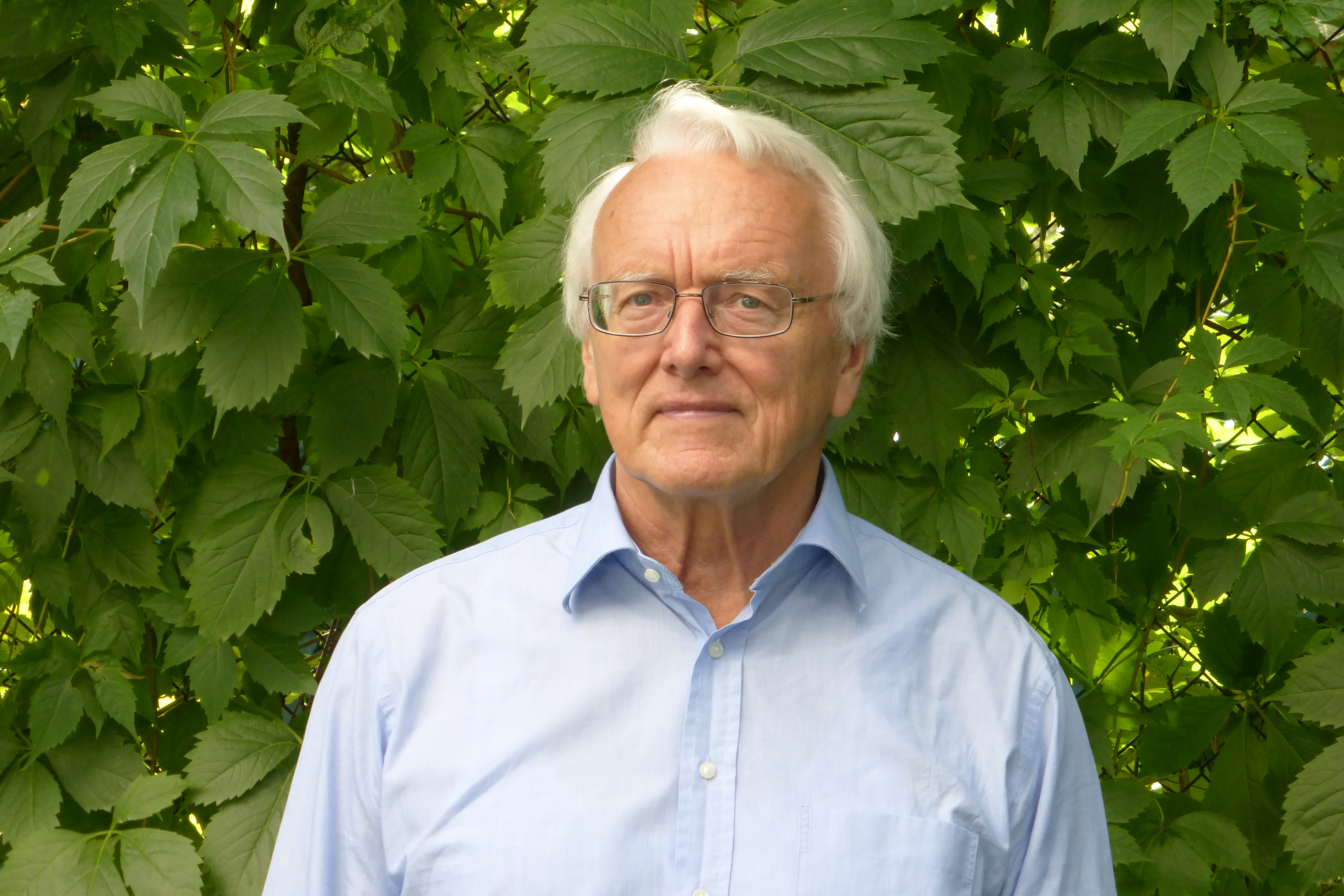 Porträtfotografie von Michael Stolleis